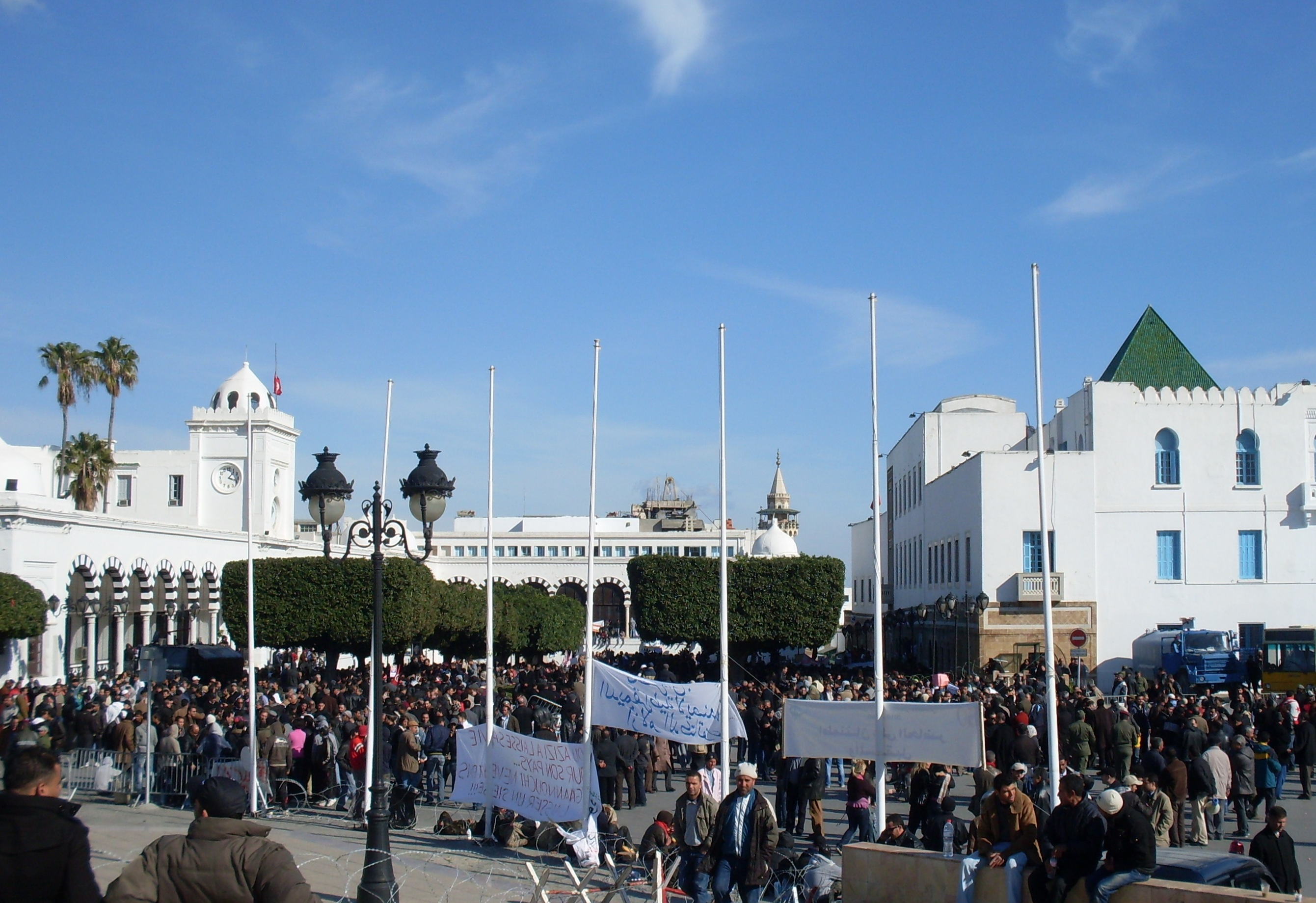 Manifestations à la place du gouvernement lors de la Caravane de la libération suite à la révolution des Jasmins